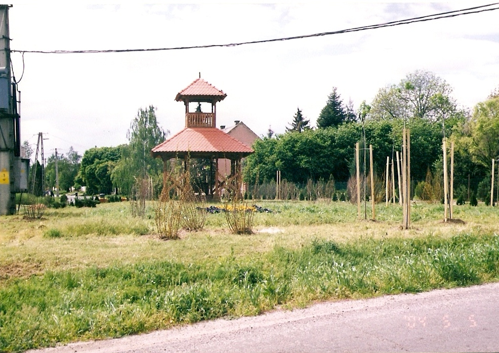 Ormánság-kapu